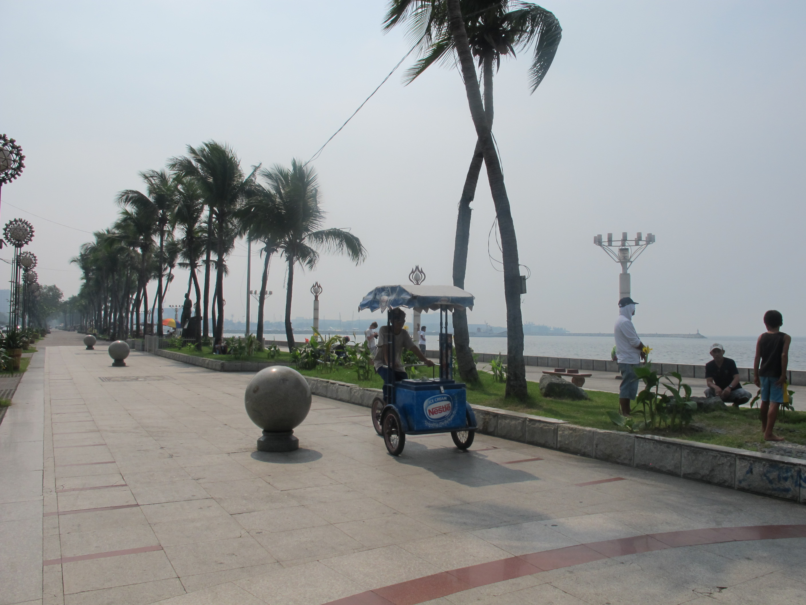 An angle of the Baywalk in Manila, Philippines